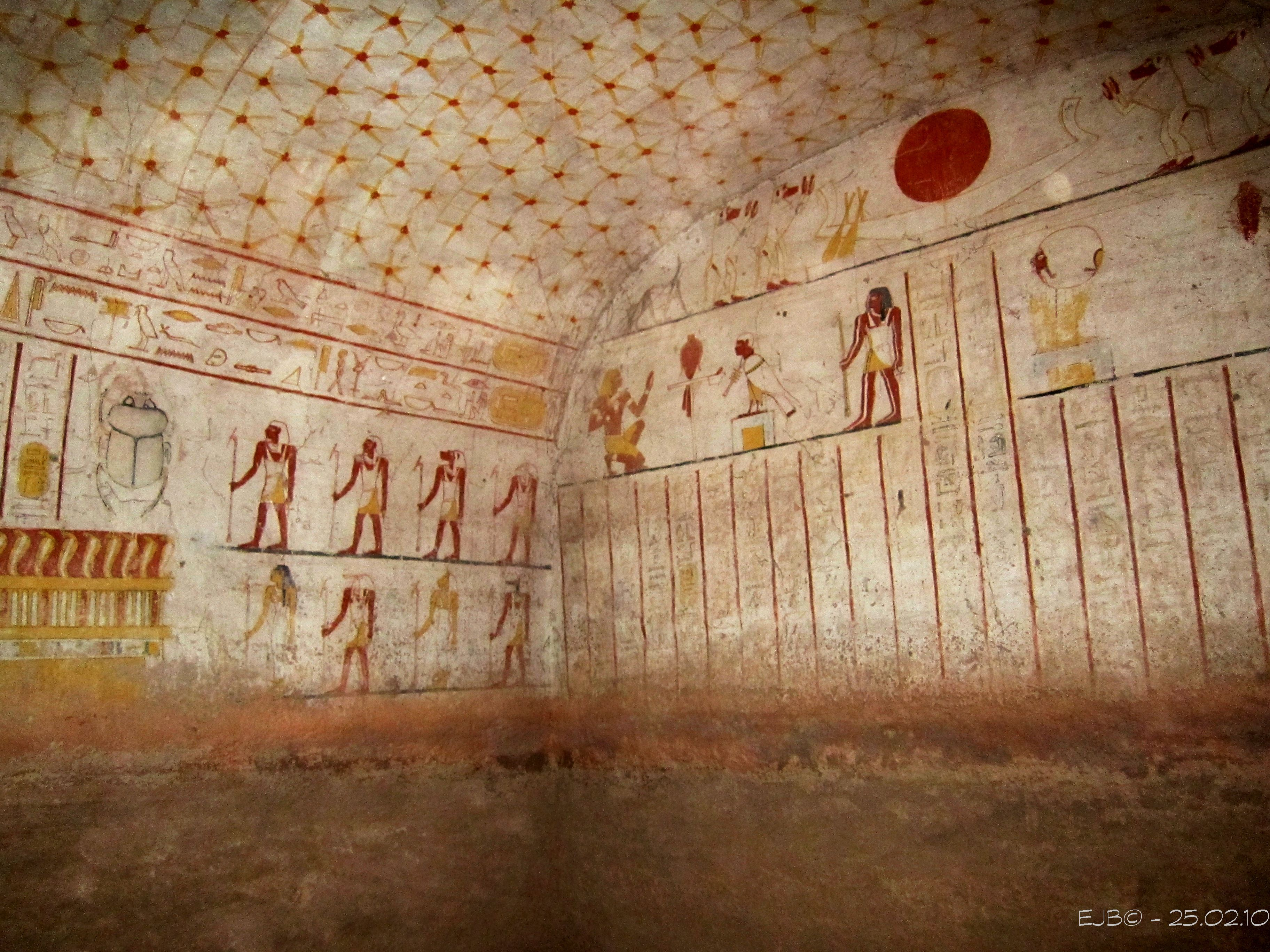 Gewölbte Grabkammer des Königs Tanotamun in El-Kurru / Sudan